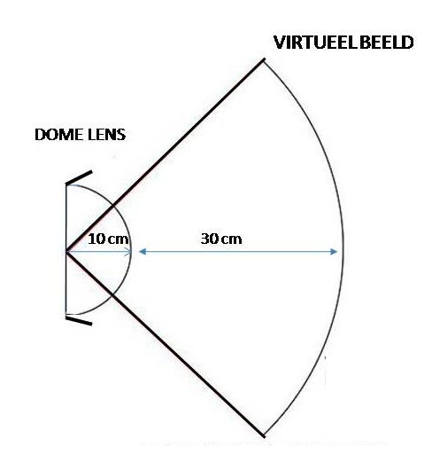 domelens